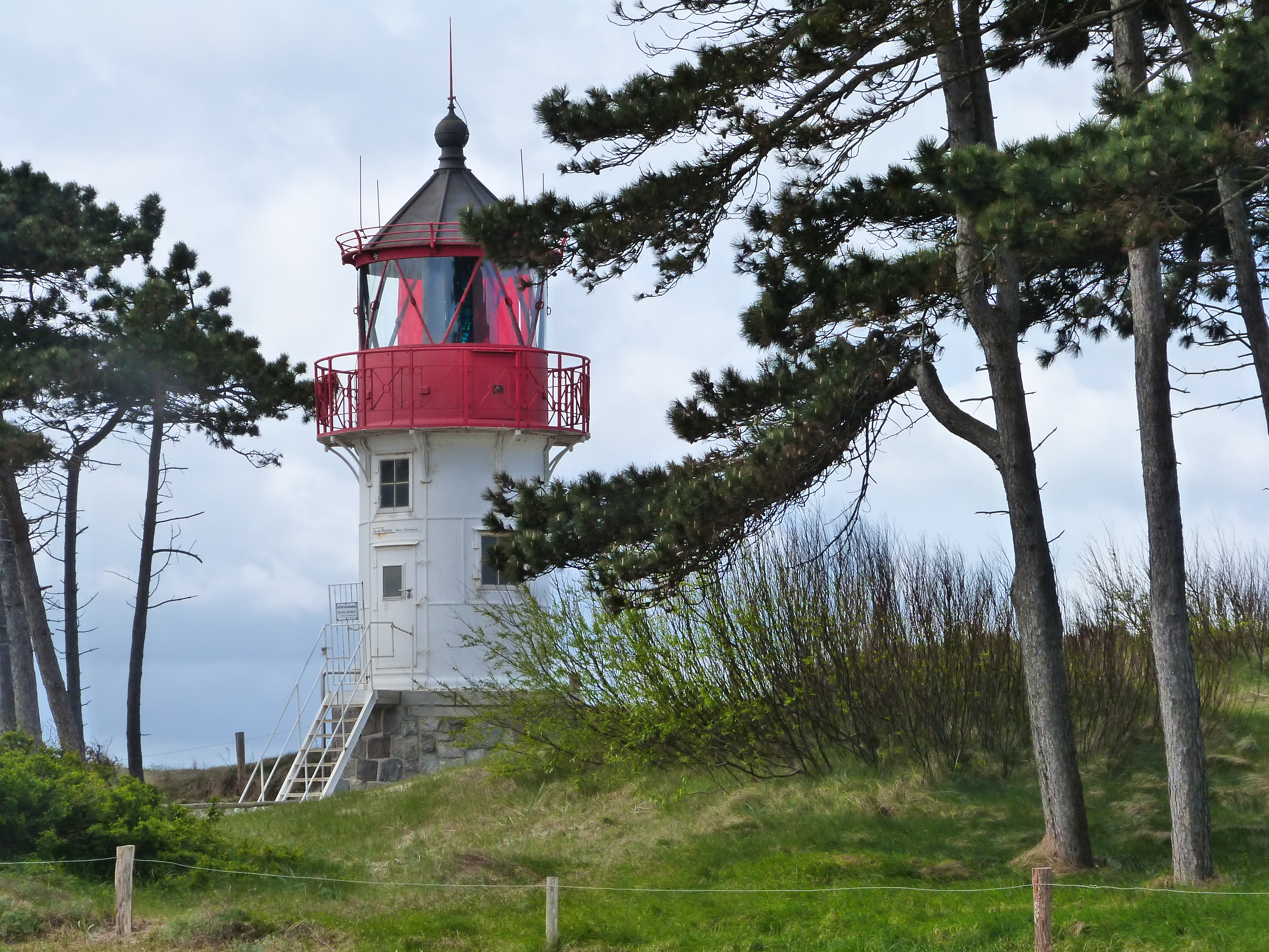 Leuchtfeuer Gellen, Hiddensee